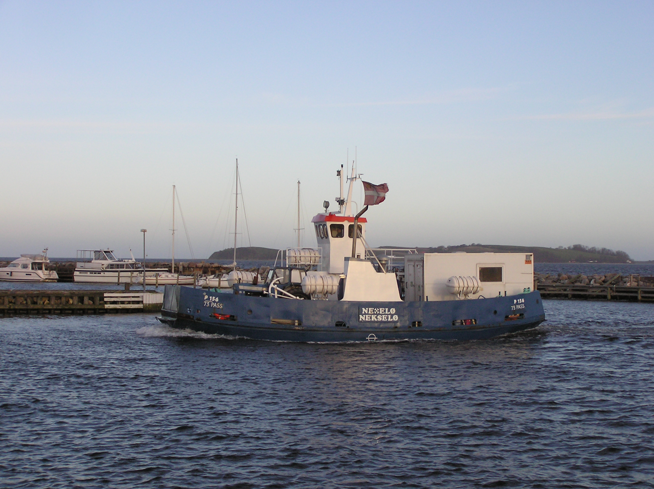 Danmark Sjælland Nekselø Fähre